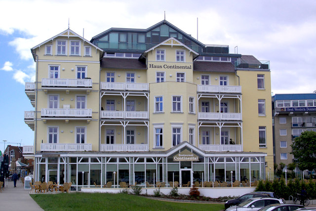 Cuxhaven - Bei der Alten Liebe